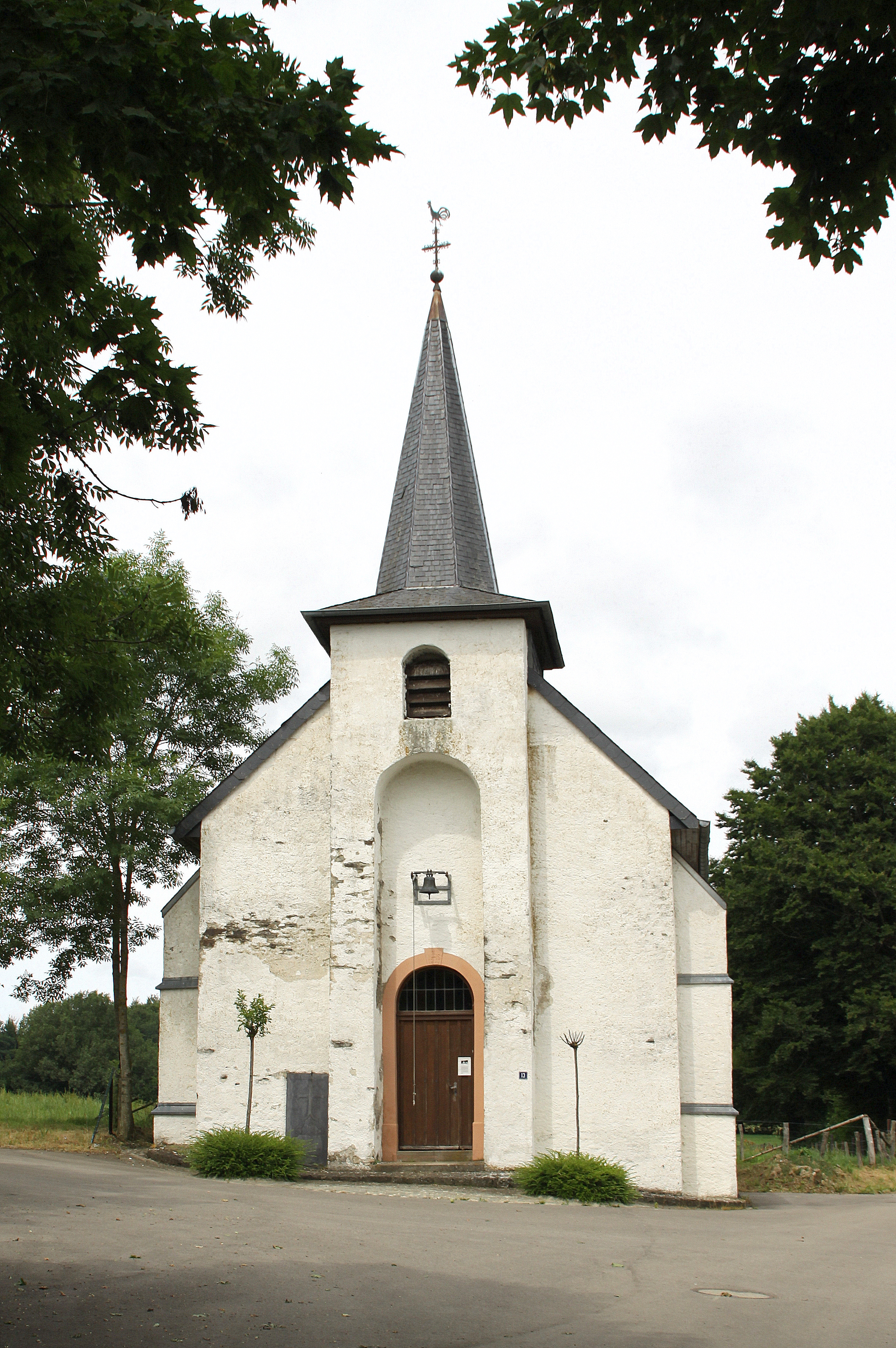 Dkierch vu Géidgen